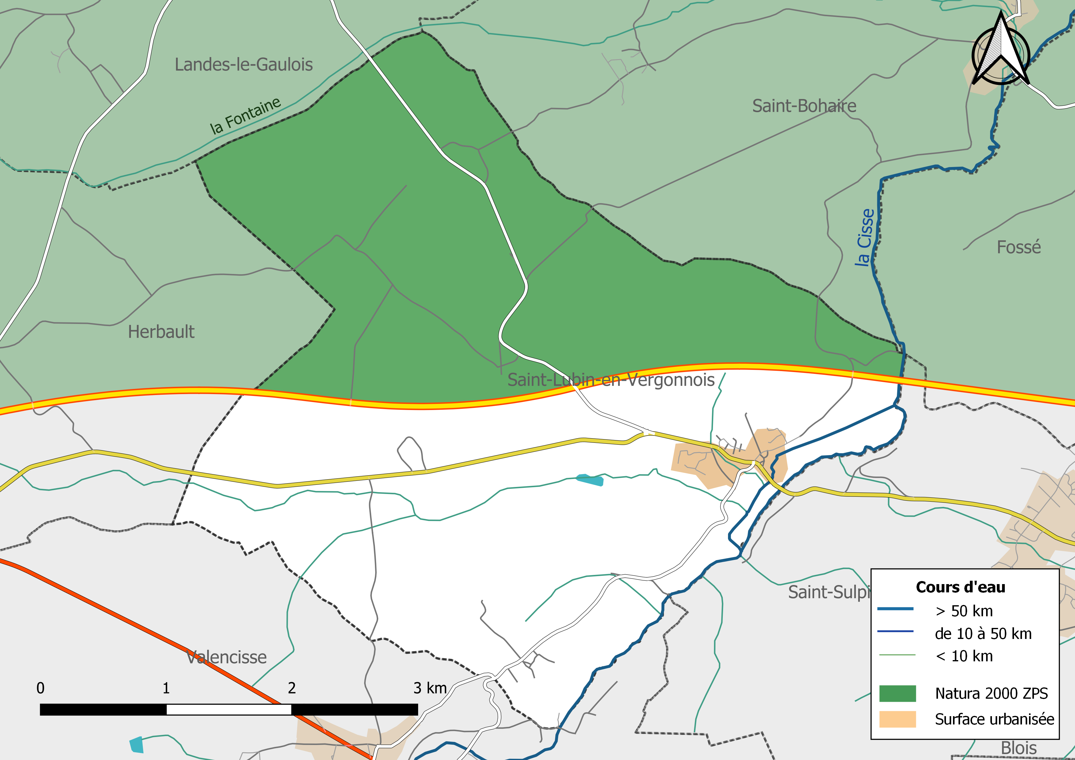 Carte du site Natura 2000 de type ZPS de la commune de Saint-Lubin-en-Vergonnois (France).